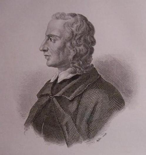 Ritratto del letterato Giovanni Vincenzo Gravina Pubblicazione: Milano, Borroni e Scotti, 1855-1858